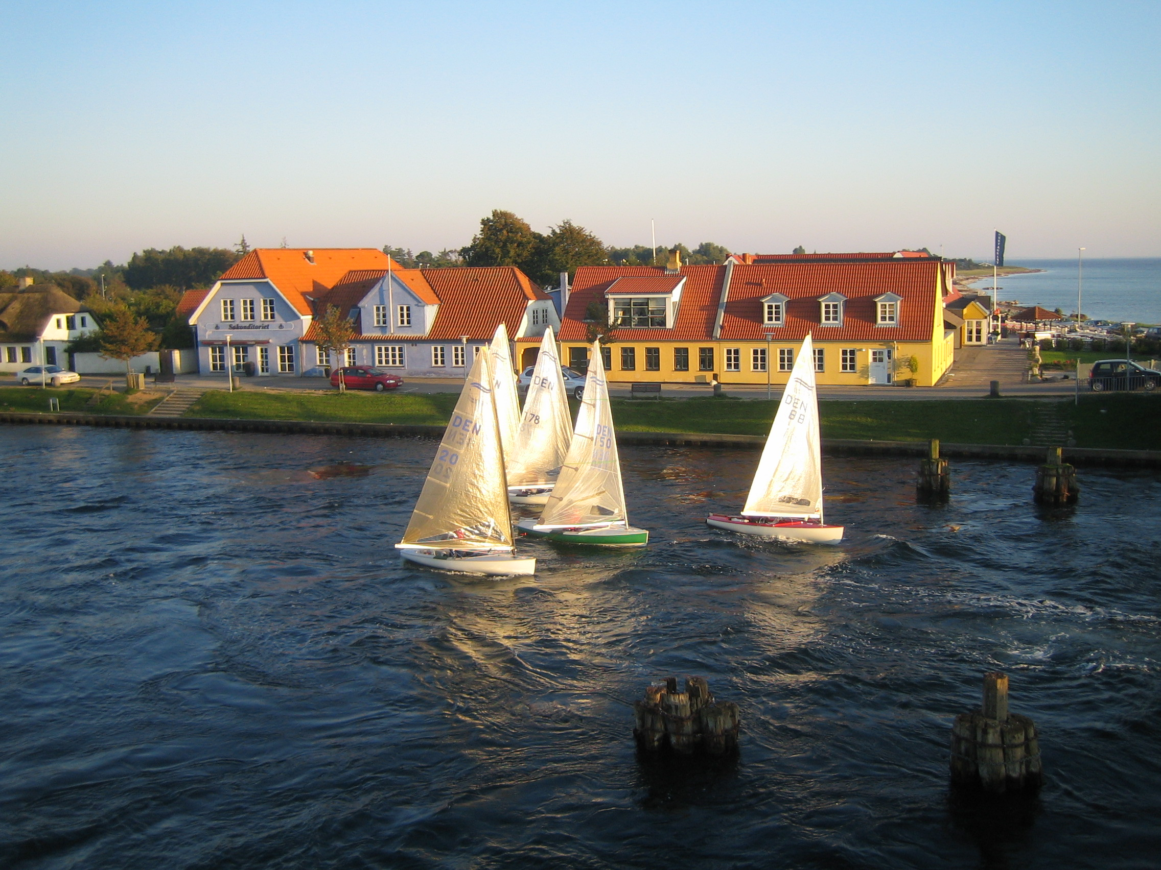 Finn dinghies in Karrebæksminde, Denmark other version: Image:Finn dinghies 01.jpg